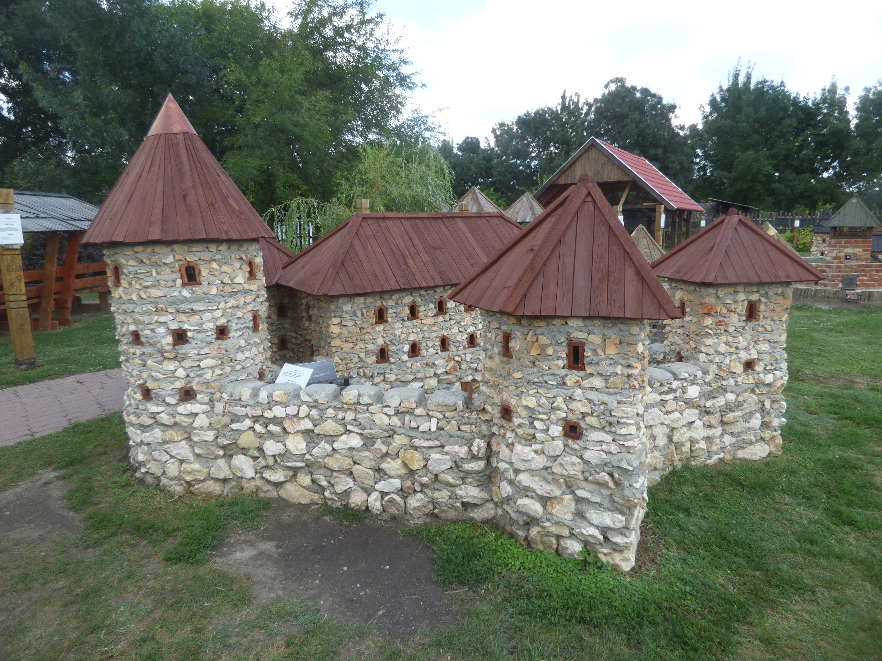 Lászlóvára makettje a dinnyési Várparkban